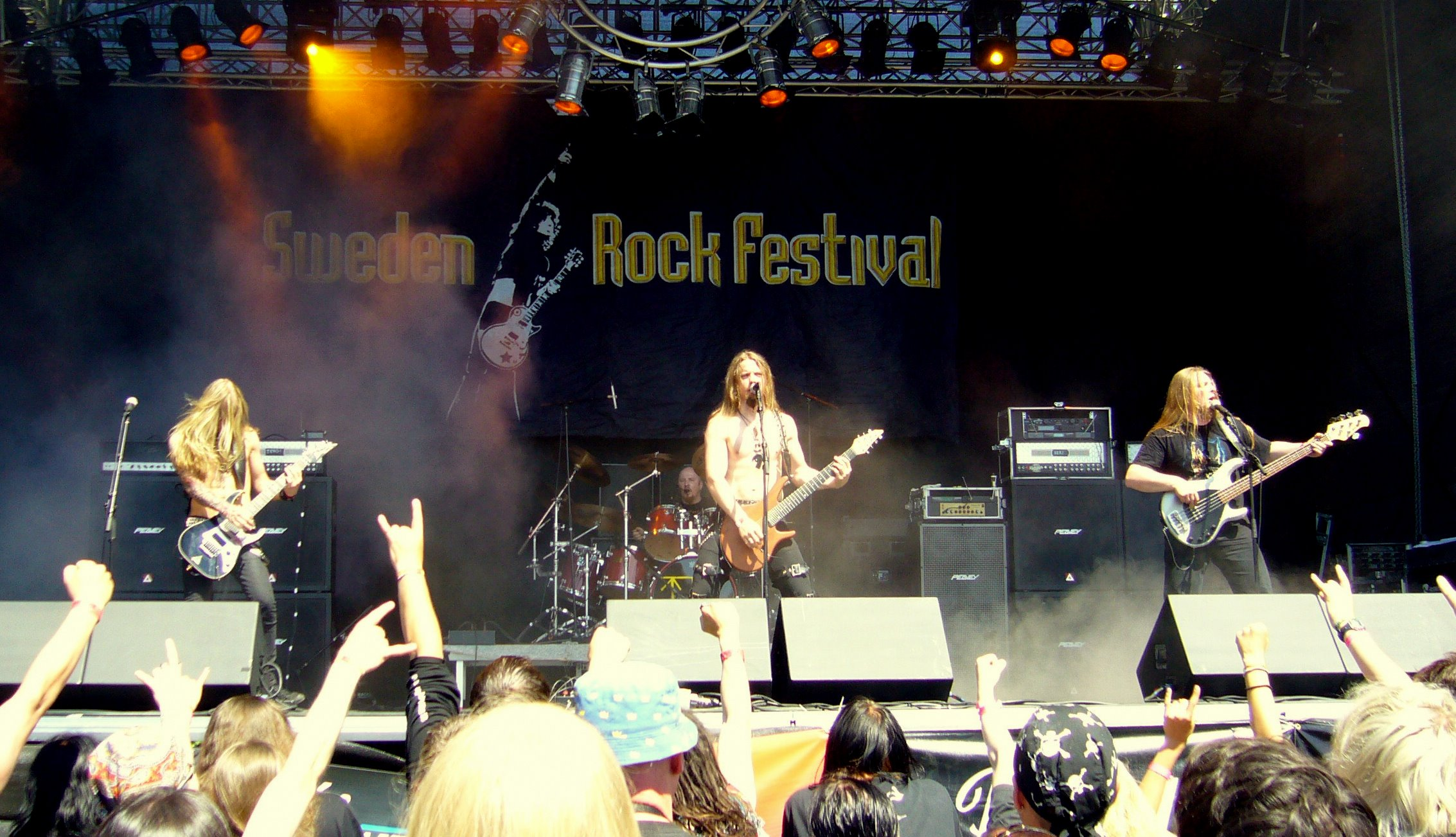 Sweden Rock 08-06-2007 12.00.39